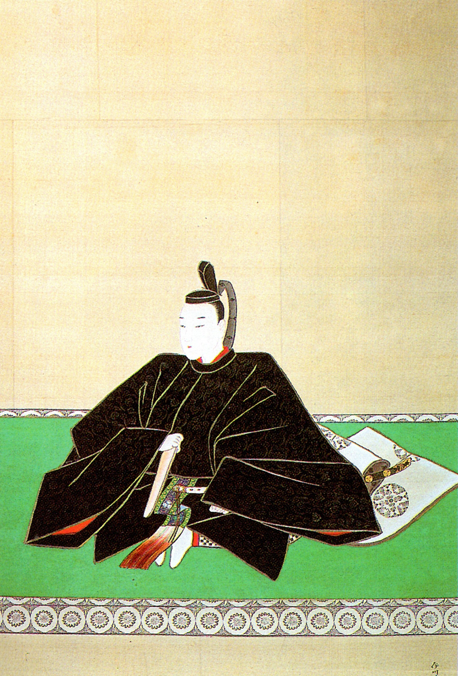 松平容住の肖像。